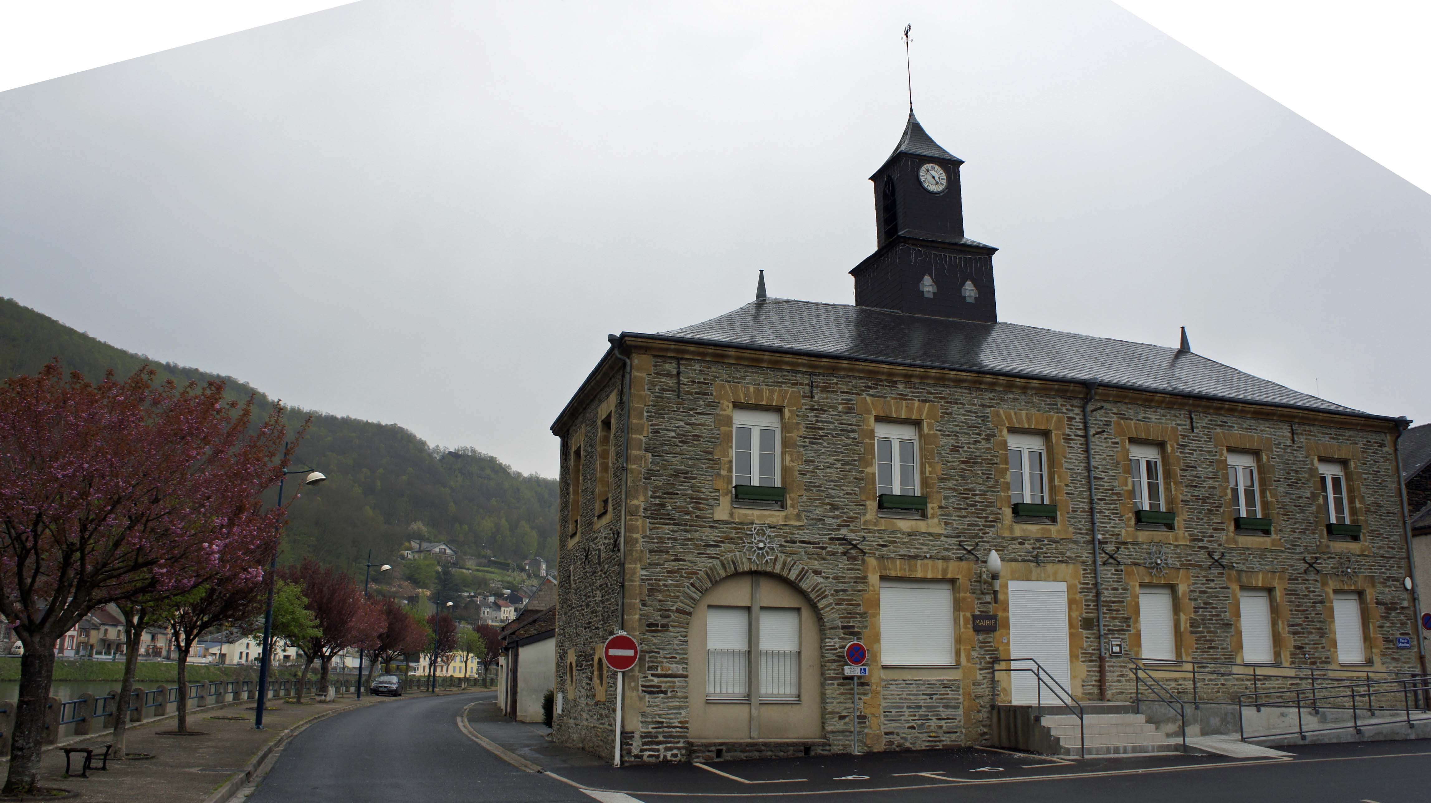 La Mairie de Monthermé.